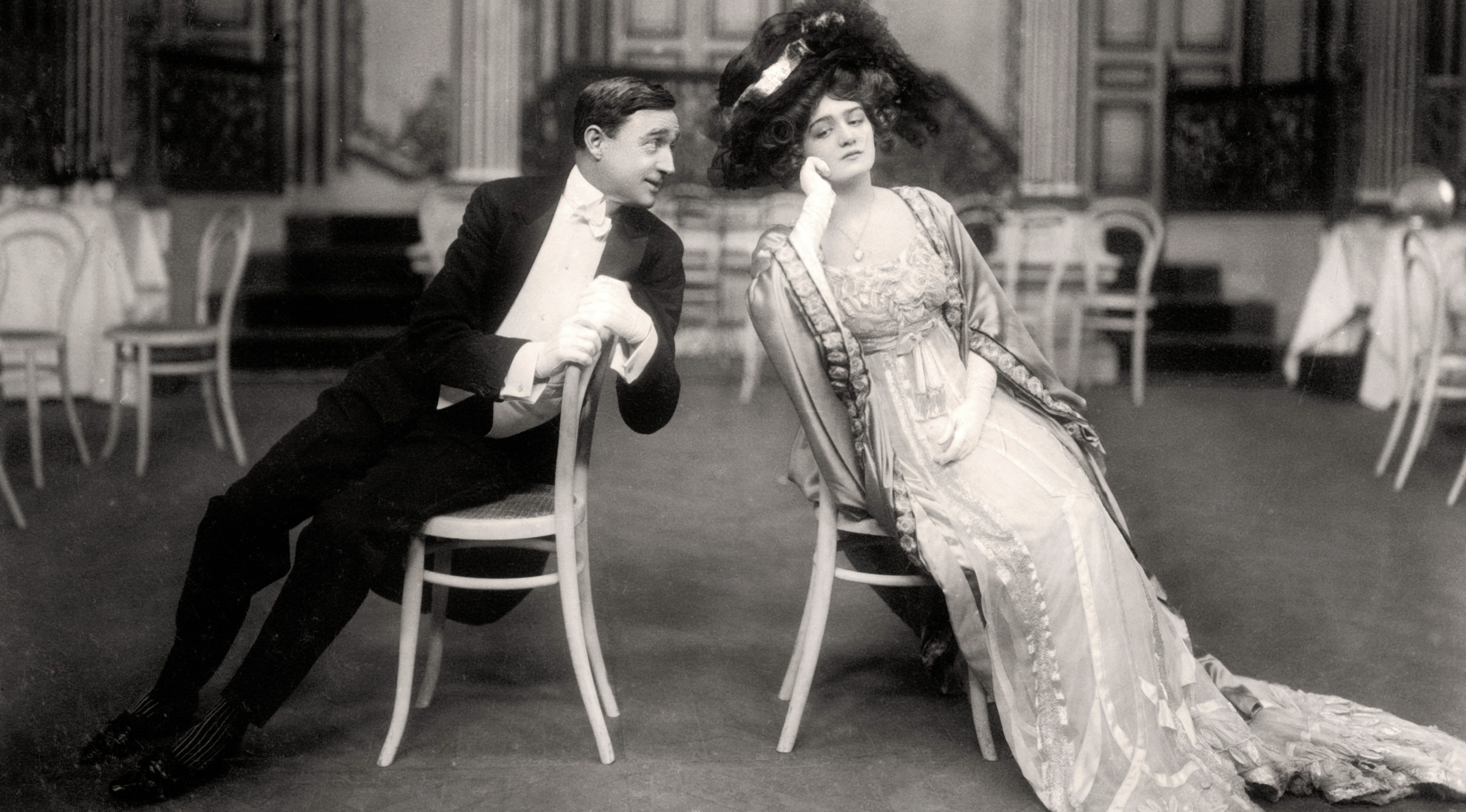 Szenenbild aus der Operette die Lustige Witwe mit den Darstellern Lily Elsie and Joseph Coyne in einer Aufführung in London im Jahr 1907